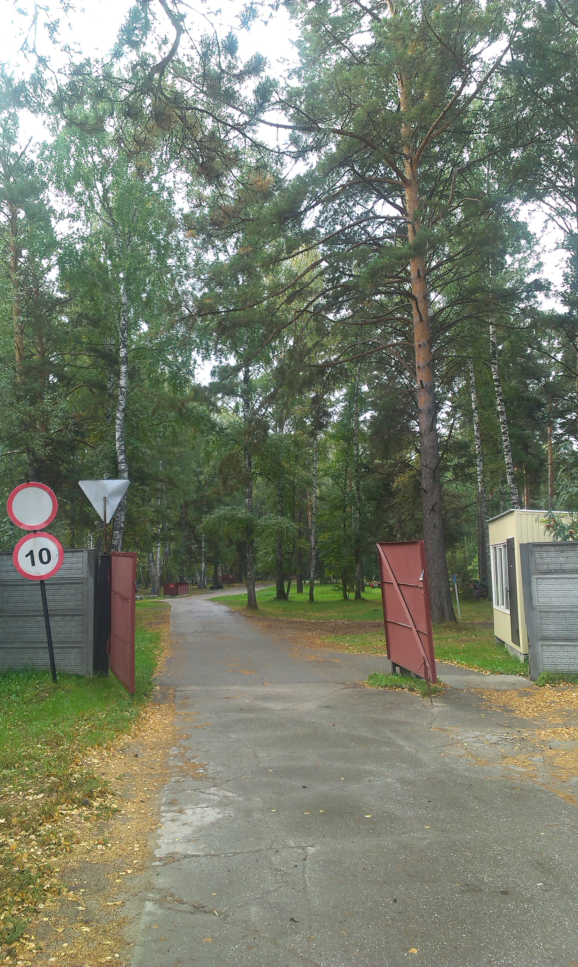 Южное (Чербузинское) кладбище. Вход